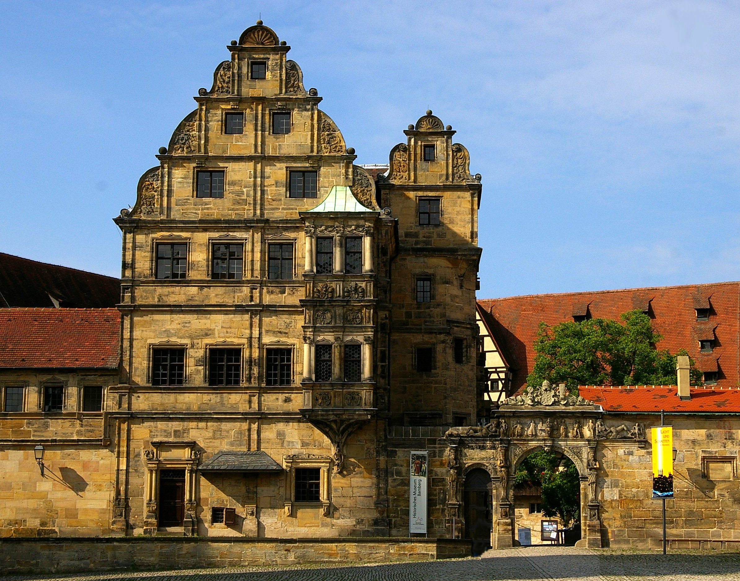 Bamberg - Alte Hofhaltung - Fassaden am Domplatz